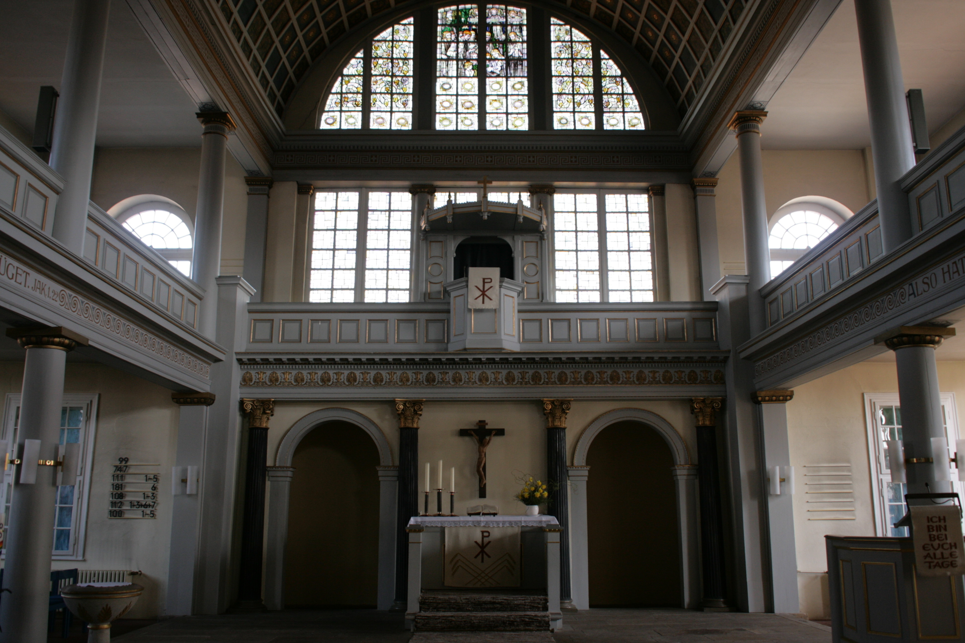 Sankt Petri, Hauptstraße in Bad Bodenteich